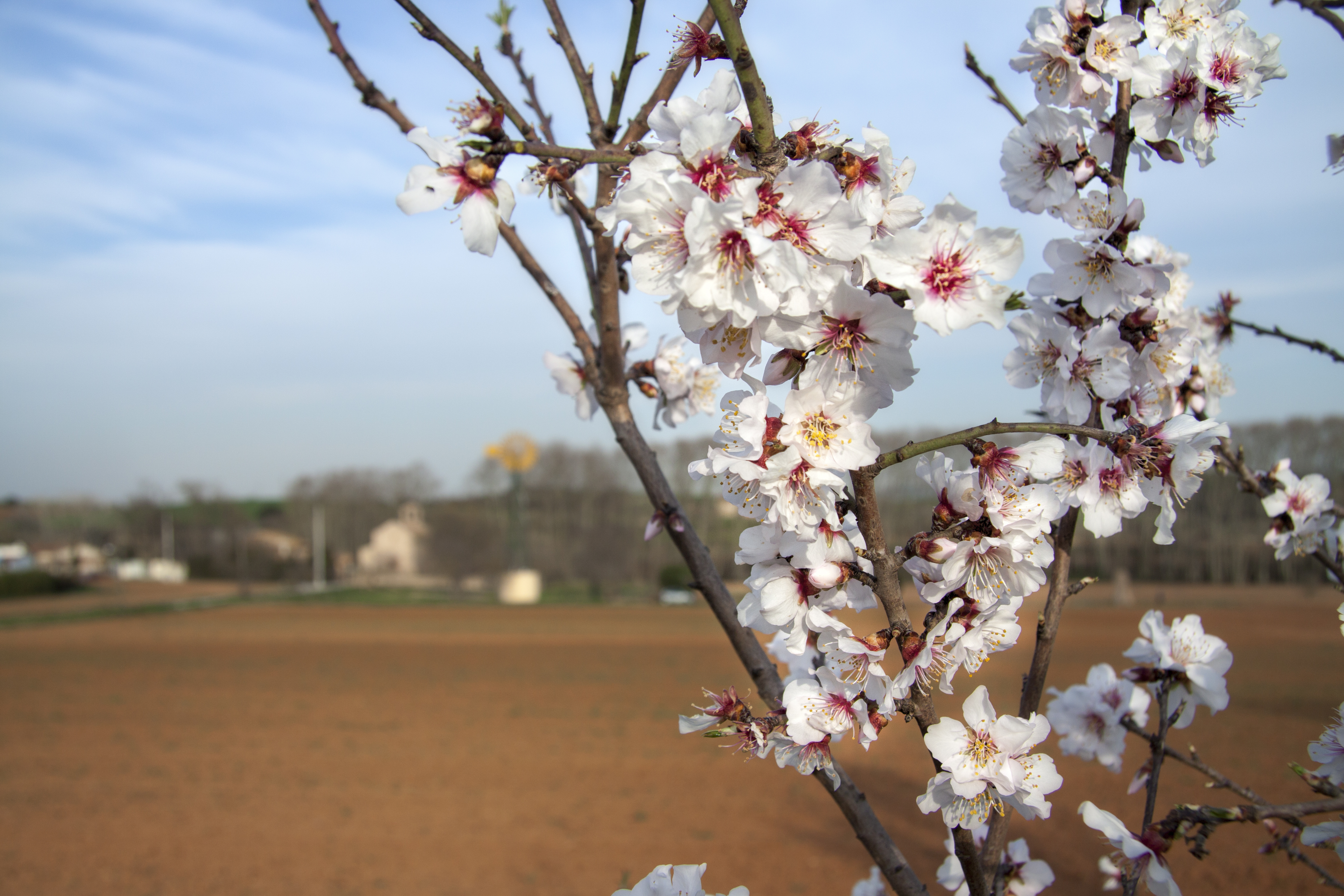 Espai rural de Gallecs This is a a photo of a natural area in Catalonia, Spain, with id: ES510277